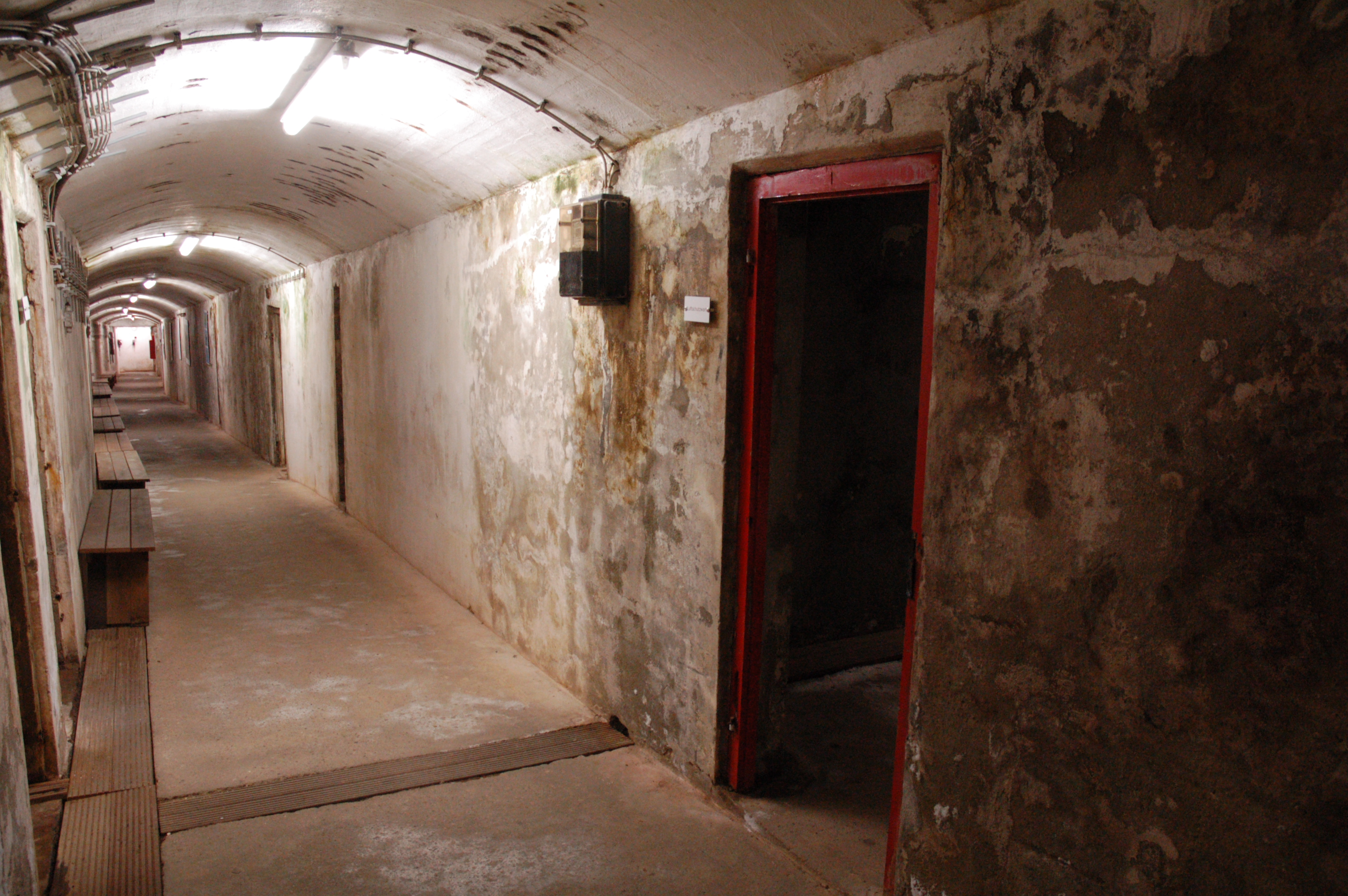 In den Bunkeranlagen von Helgoland